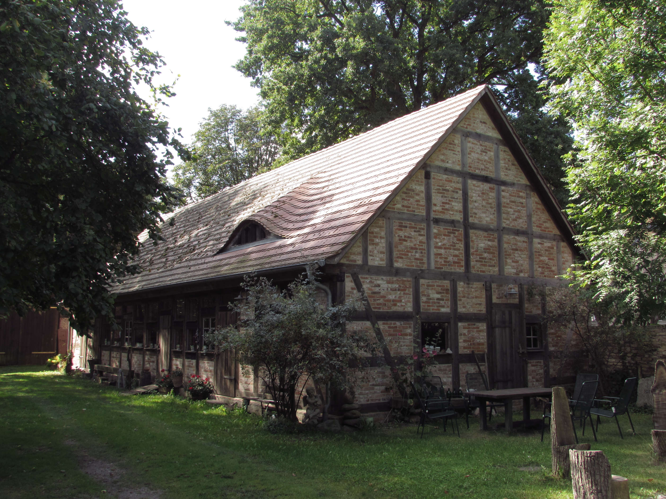 pfarrstall pritzerbe